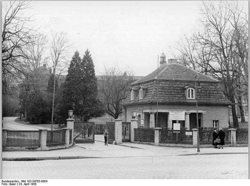 Berlin, Hufeland-Krankenhaus, Orthopädie, Eingang Zentralbild Baier Quaschinsky-Ho. 24.4.1958 Berlin, Im Ortsteil Berlin-Buch - im Norder der Stadt- ist ein grosser Teil der Krankenhäuser konzentriert. UBz: Der Eingang zur orthopädischen Abteilung des "Hufeland-Krankenhauses."